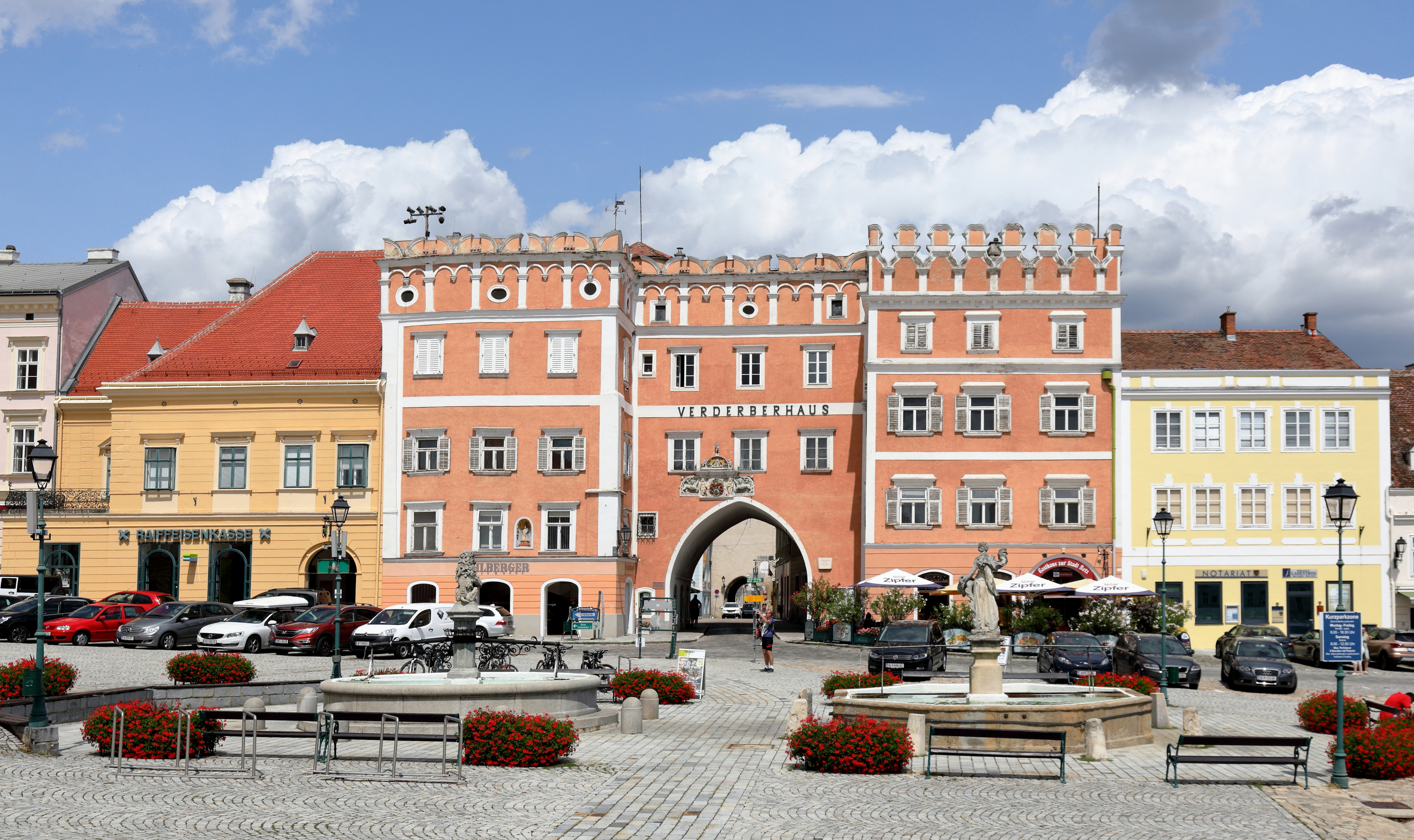 Das Verderberhaus in der niederösterreichischen Stadtgemeinde Retz.Ein mehrteiliger, zinnenbekrönter Gebäudekomplex im venezianischen Renaissancestil aus dem 16. Jahrhundert am Hauptplatz mit den Hausnummern 2 und 34. Benannt ist das Gebäude nach den „Verderberbrüdern“, zugezogene Kaufleute aus dem heutigen Slowenien.